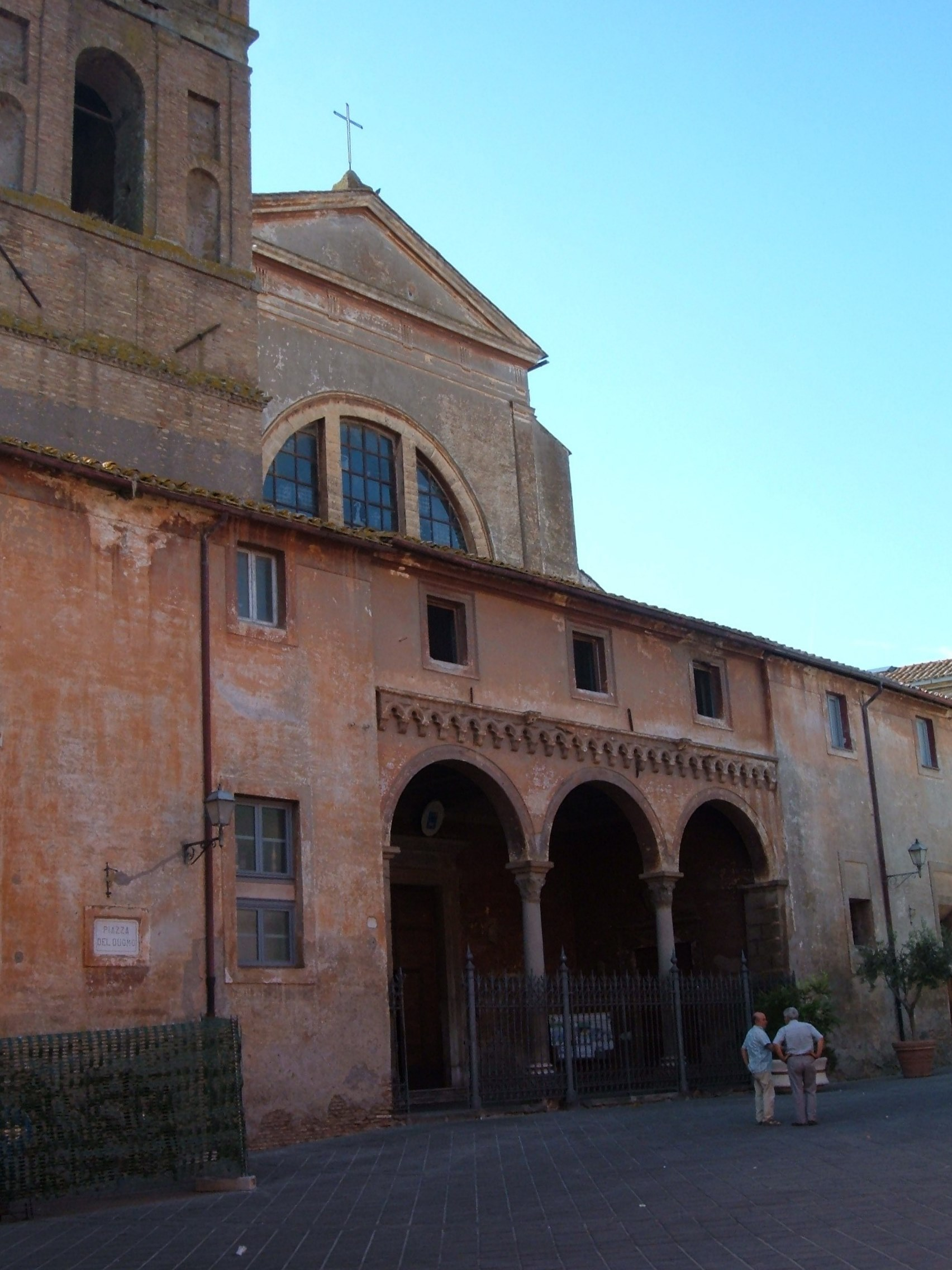 Cattedrale di Nepi